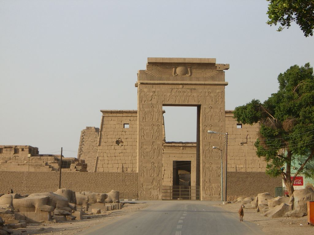 La grande porte d'accès du temple de Khonsou à Karnak - Dynastie ptolémaïque